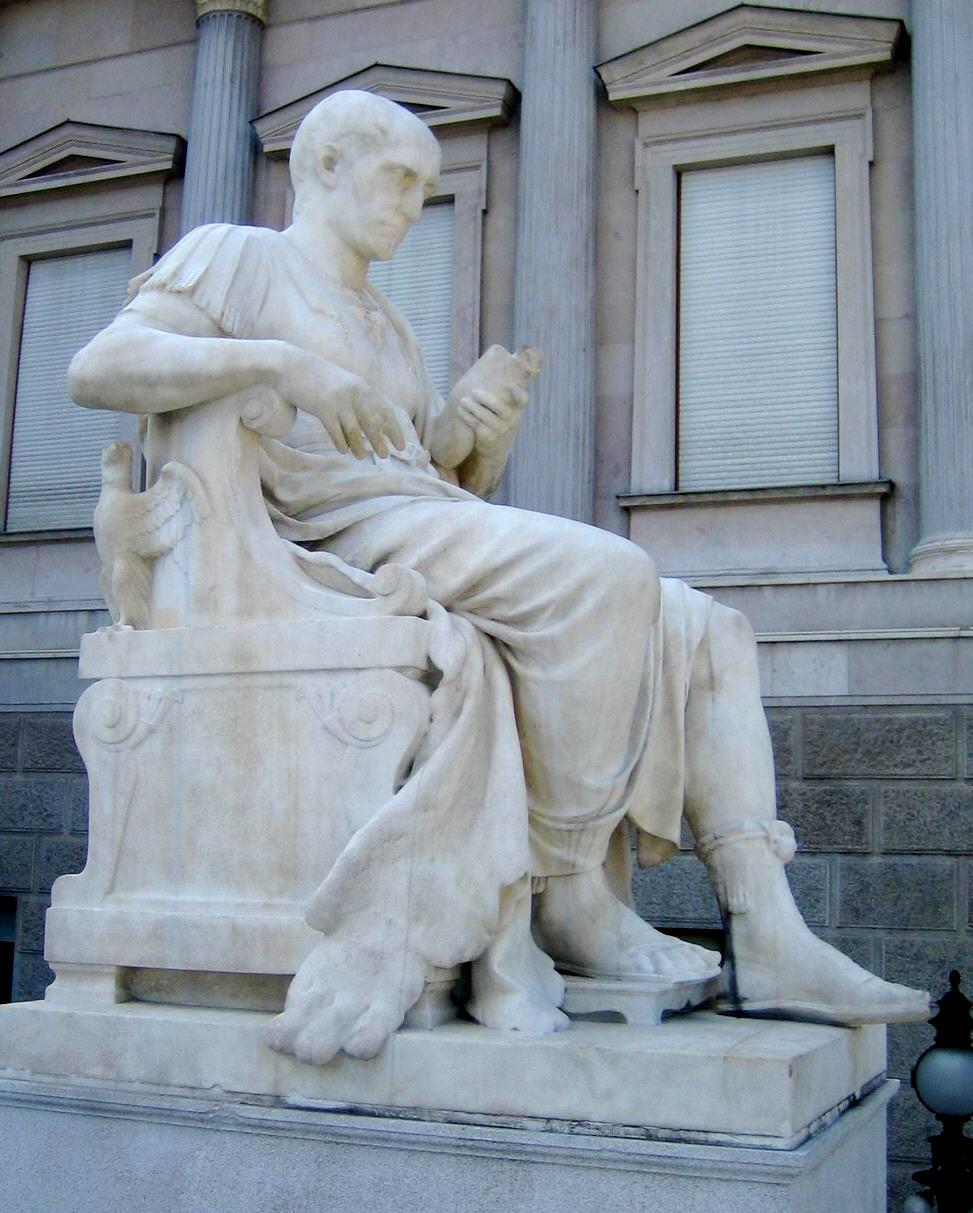 Julius-Caesar-Statue auf der rechten Rampe des Parlaments: römische Seite